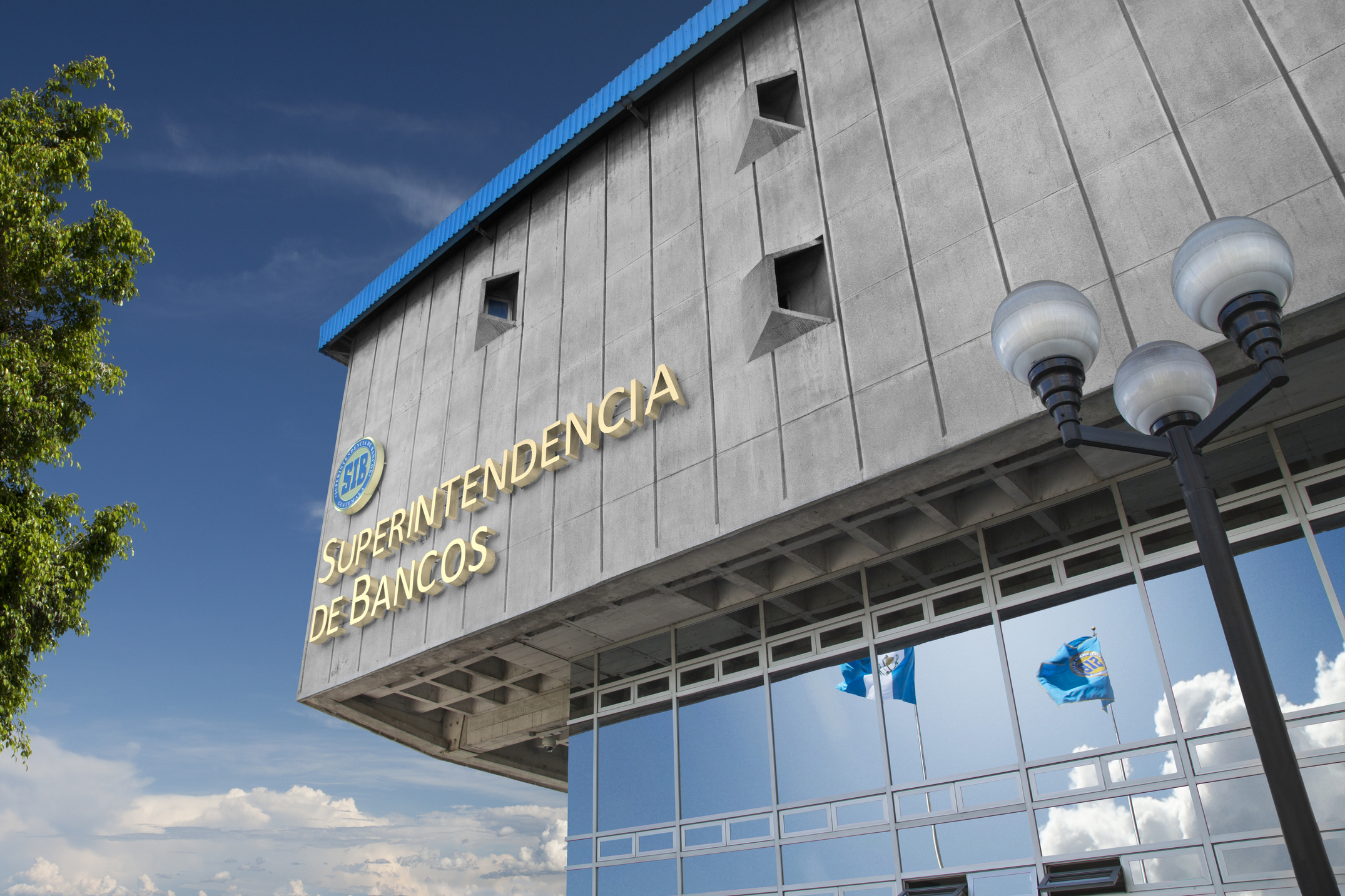 Edificio de la Superintendencia de Bancos